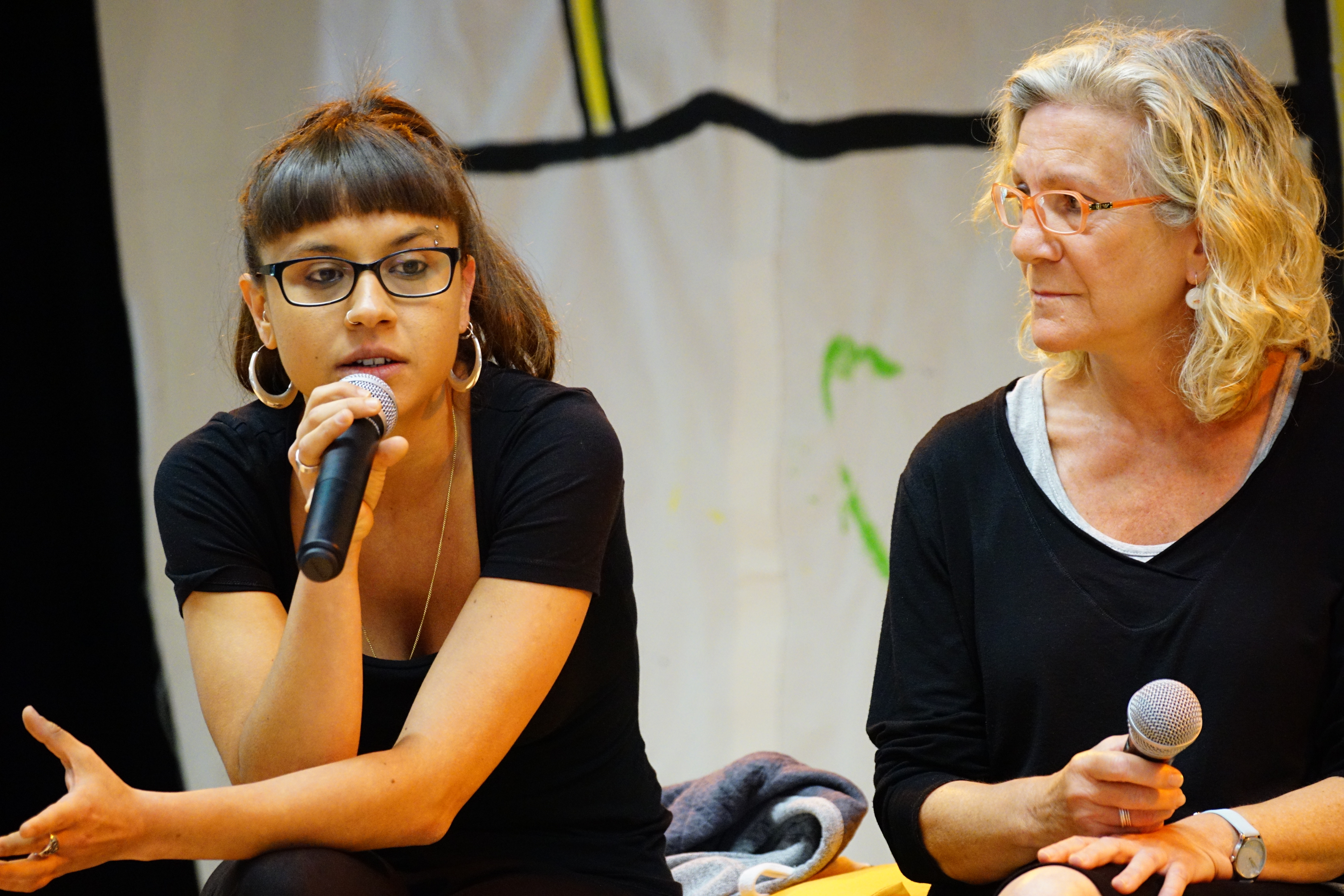 Jornades "Les llavors ja han germinat" organitzades per la CUP-Capgirem Barcelona, per analitzar el seu primer any a les institucions.